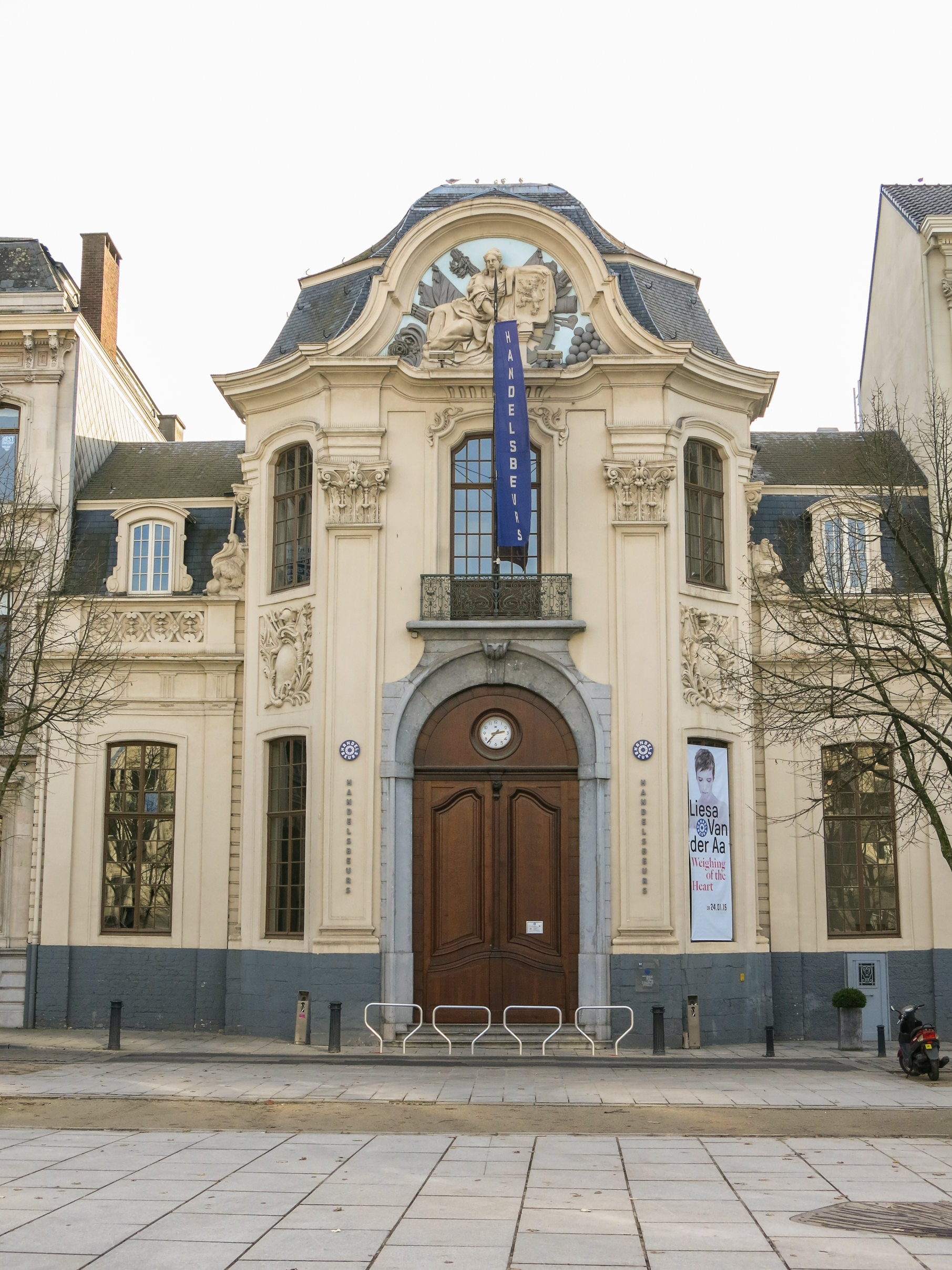 Handelsbeurs